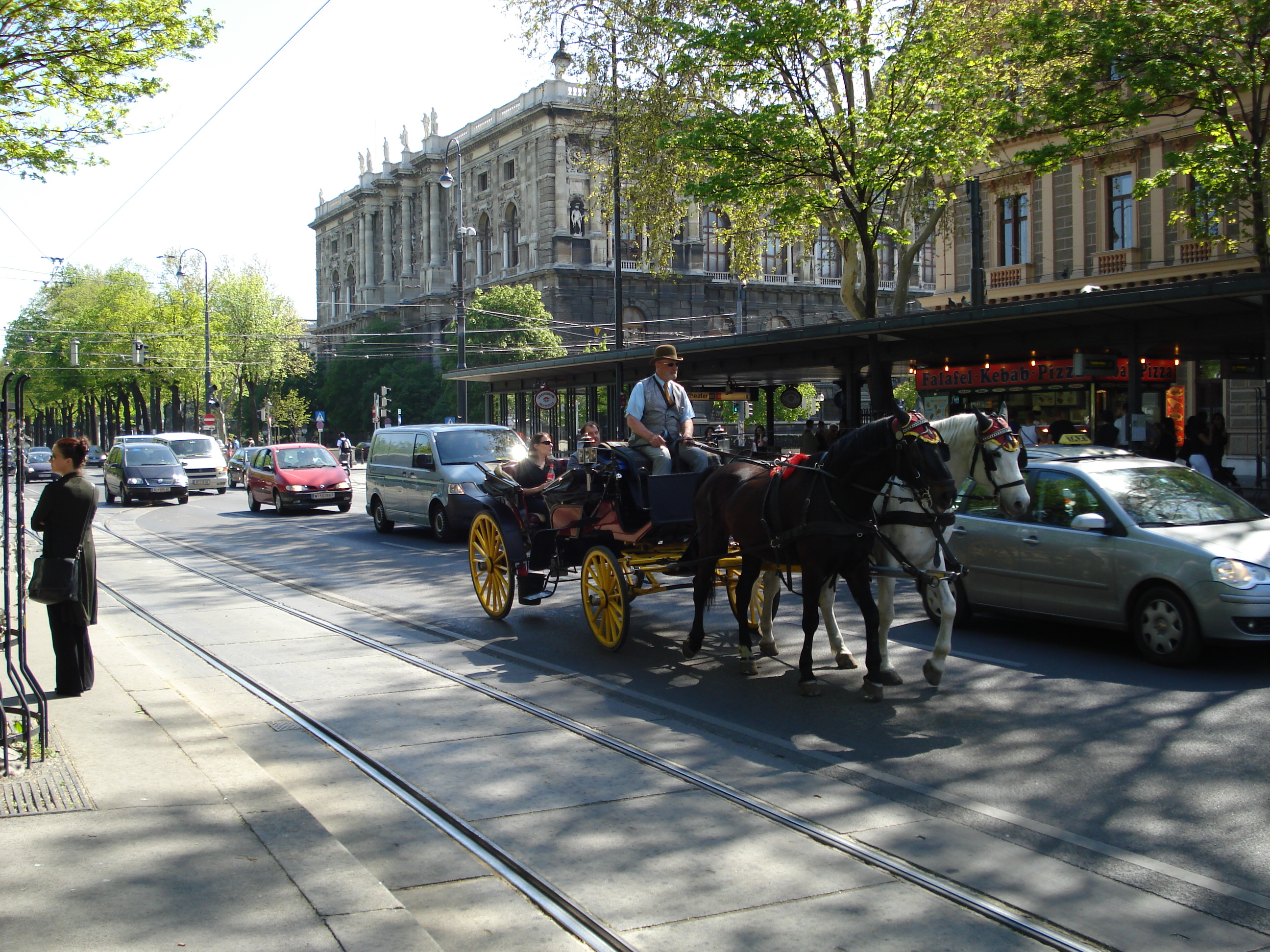 Selbst photographiert! Vienna, Ringstrasse. U3, Volkstheater